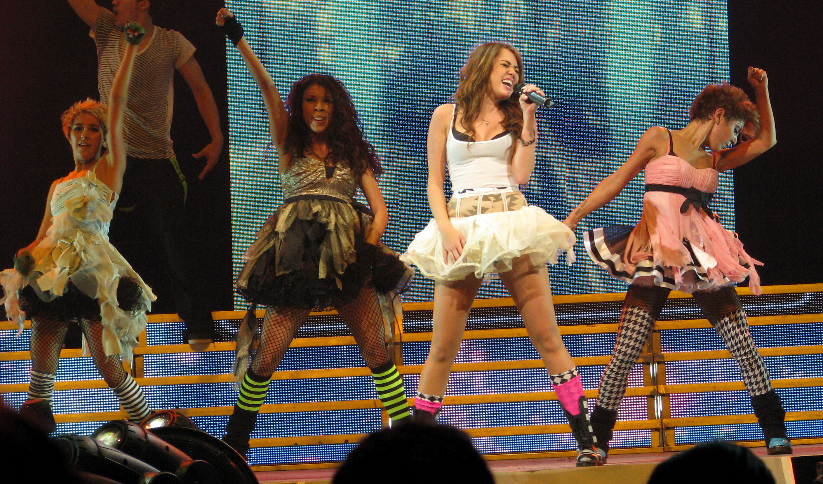 A teen singing.